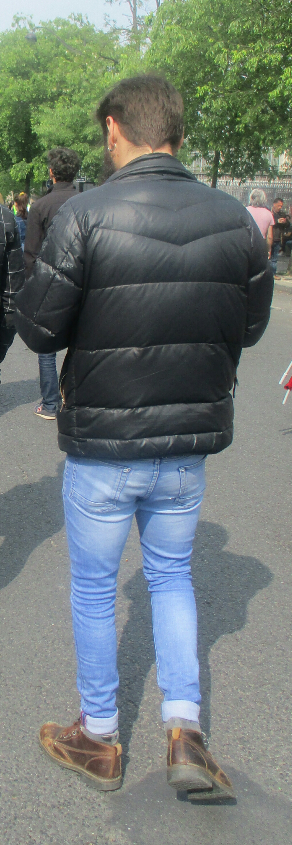 Doudoune noire jeans.